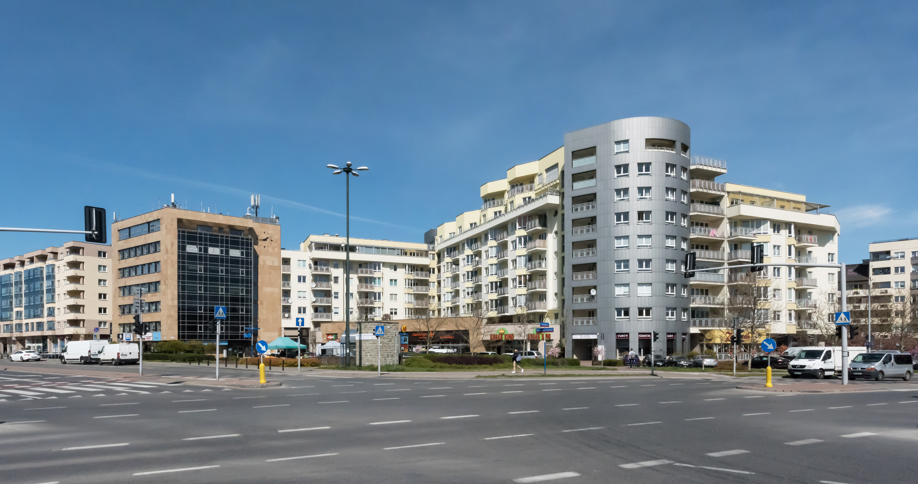 Skrzyżowanie al. KEN i ul. Wąwozowej w Warszawie